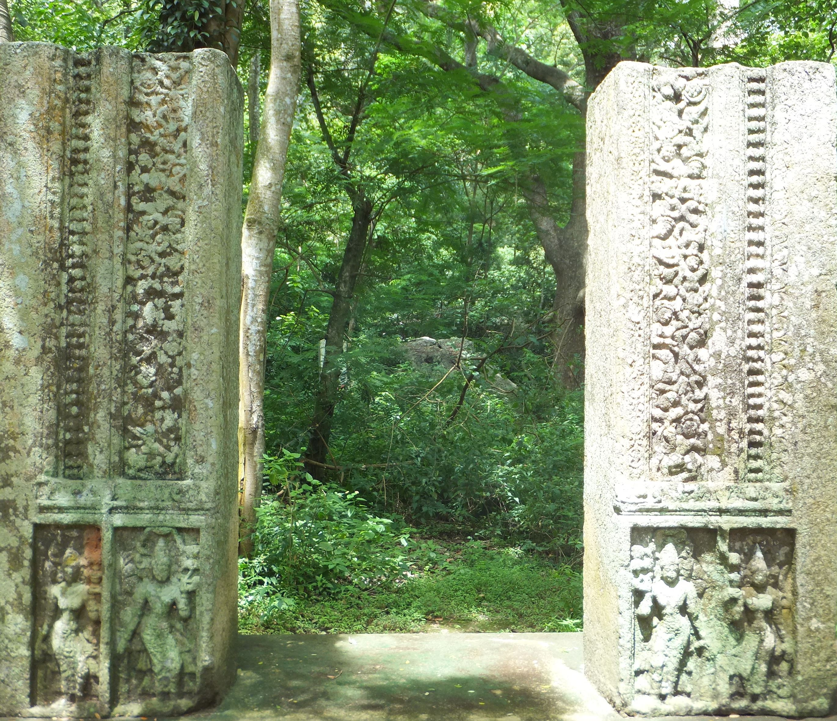 සිංහල: කුරුණෑගල දළදා මාළිගාවේ පිවිසුම